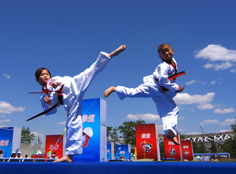 表演跆拳道的中国儿童